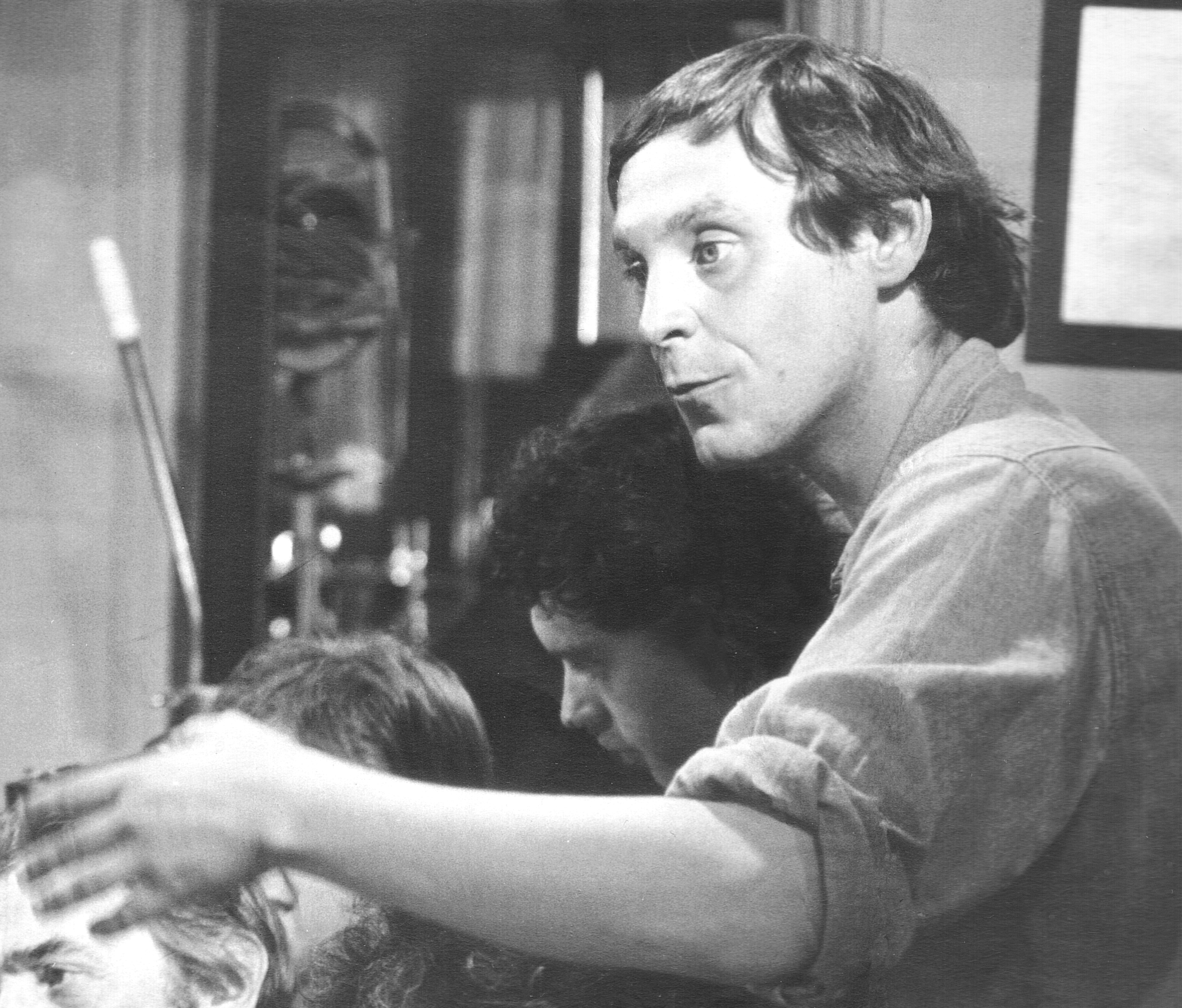 Patrick Barbéris sur le tournage de "Un voyage de Rose" (1983)